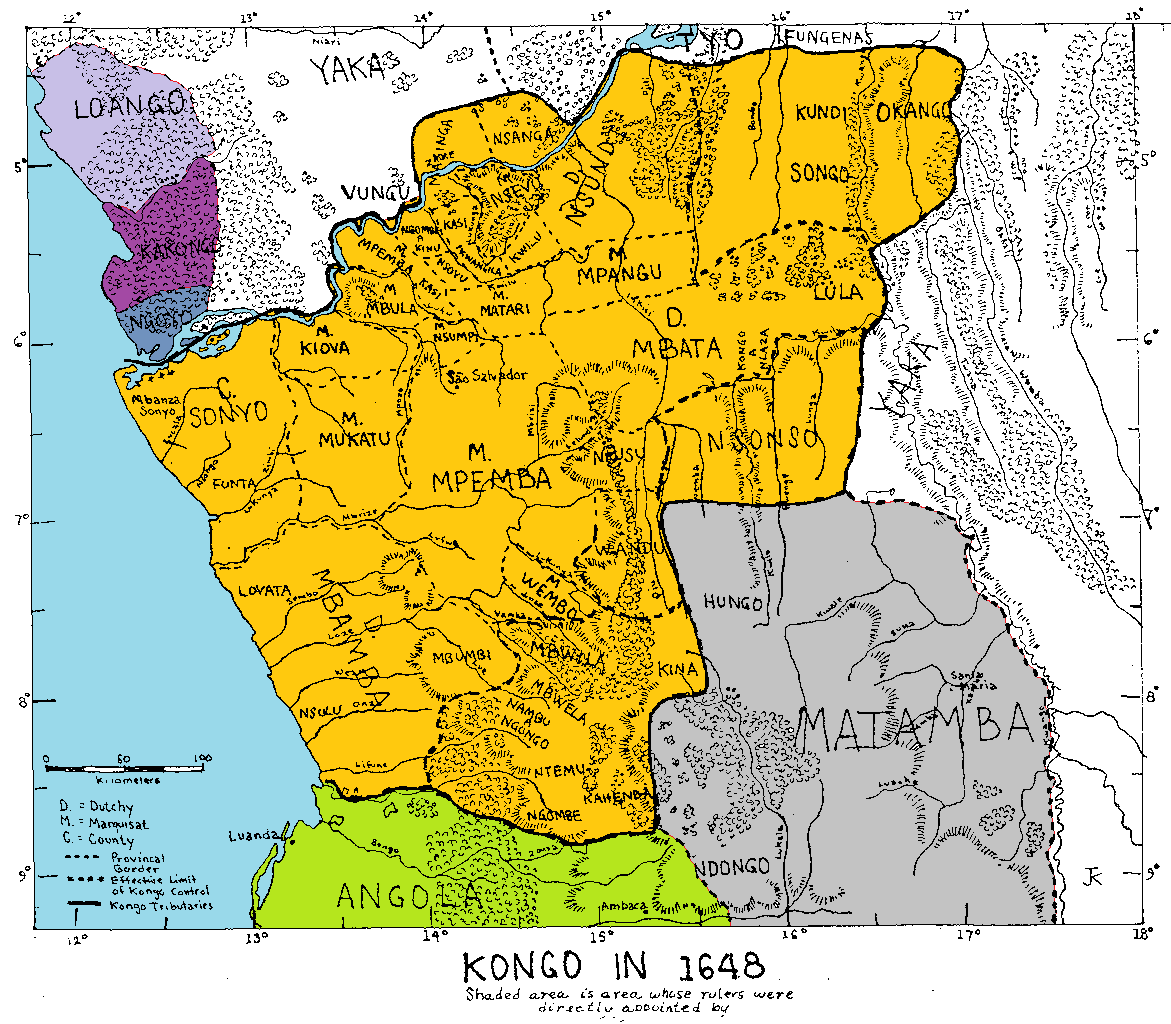 Versión de File:Lossy-page1-1171px-Kongo 1648 coloured.png